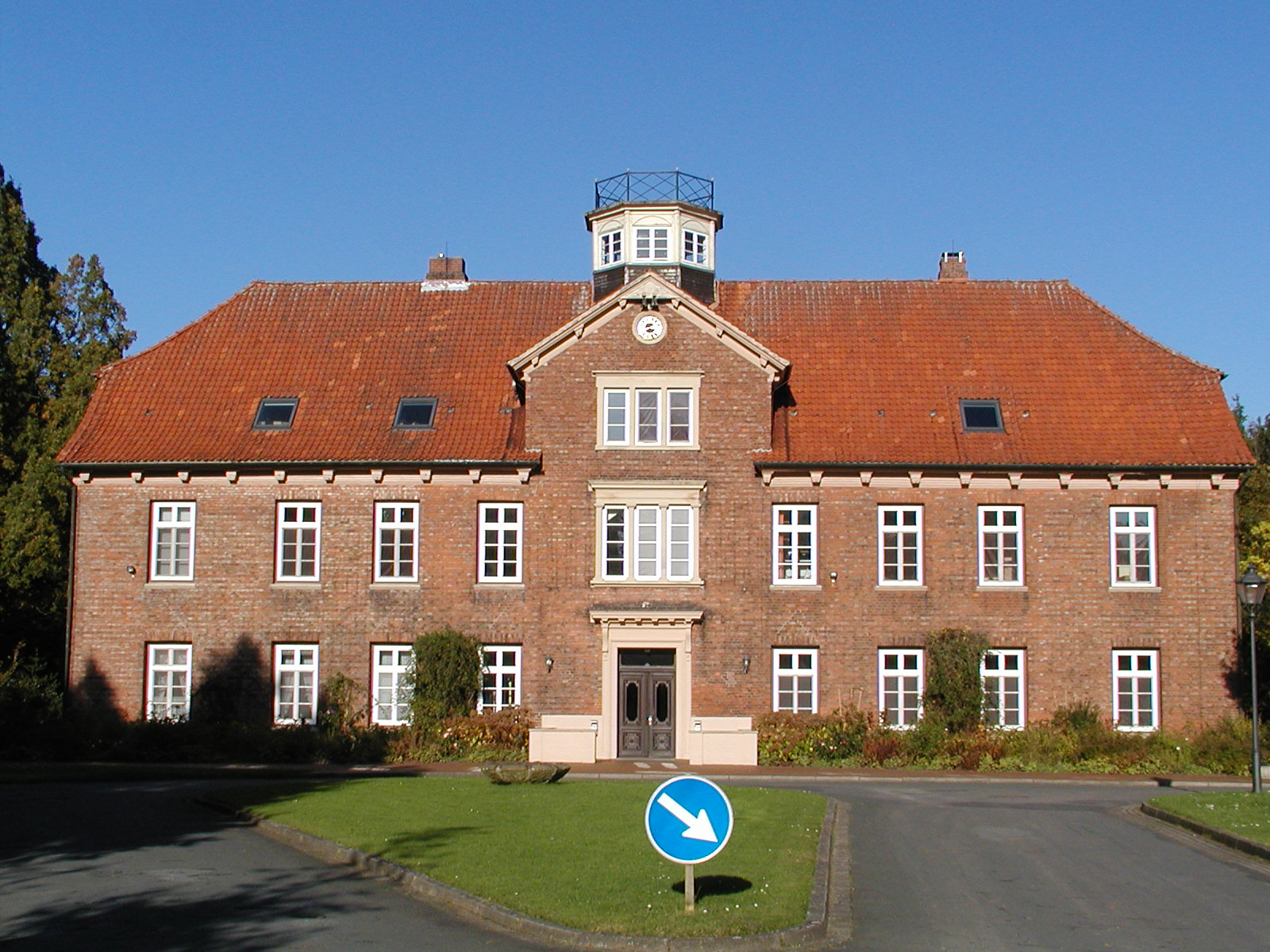 Das Schloß